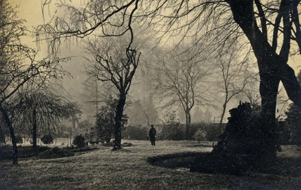 Un parc de Saint-Pavin des Champs en plein soir de givre au Mans en 1903.